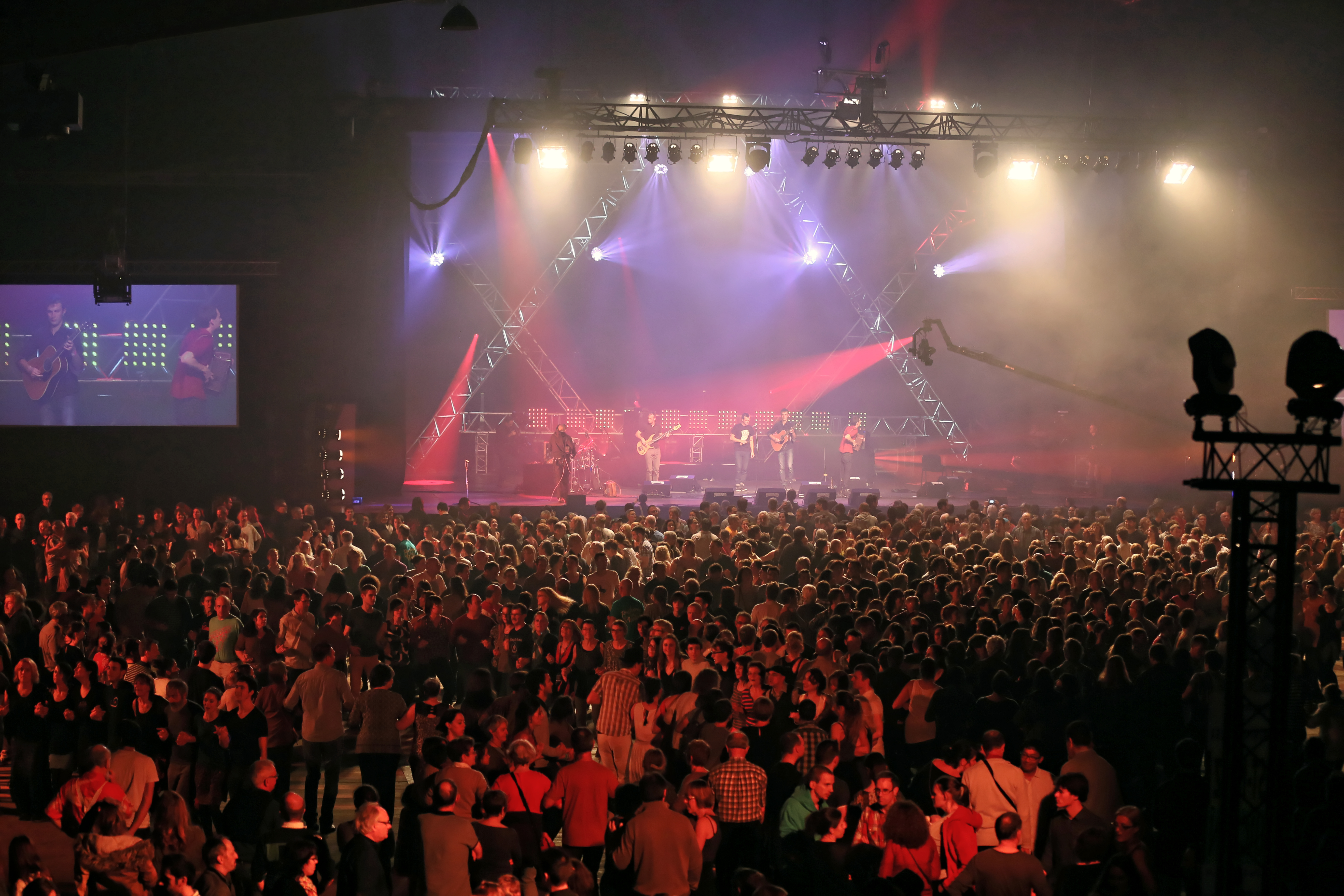 Startijenn en fest-noz lors du festival Yaouank le 21 novembre 2015 au Parc des Expositions de Rennes.